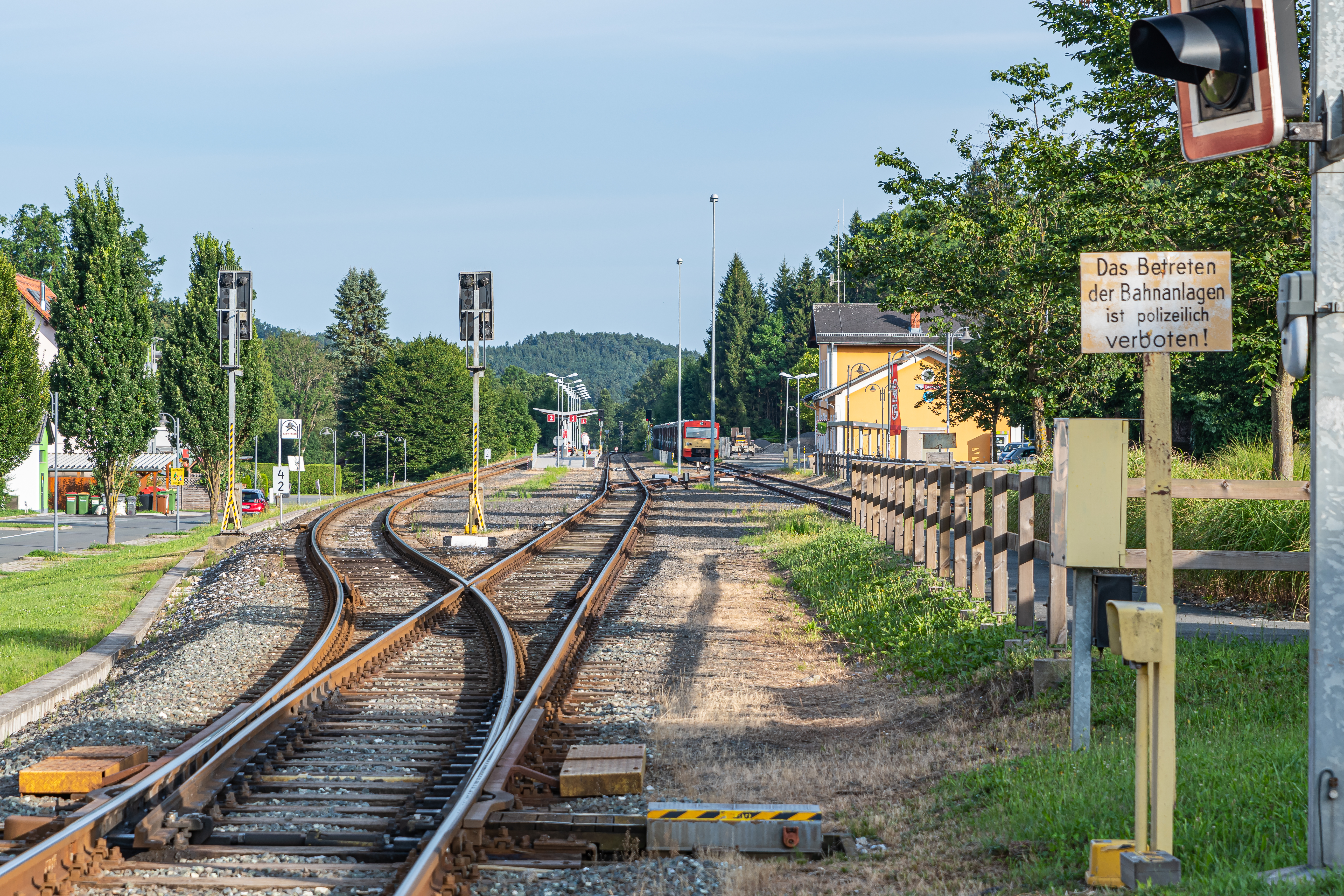 Bahnhof der Wieser Bahn in Lannach. Die Weiser Bahn ist eine Bahnstrecke in der Steiermark, die von der Graz-Köflacher Bahn und Busbetrieb GmbH betrieben wird und von Lieboch nach Wies-Eibiswald führt